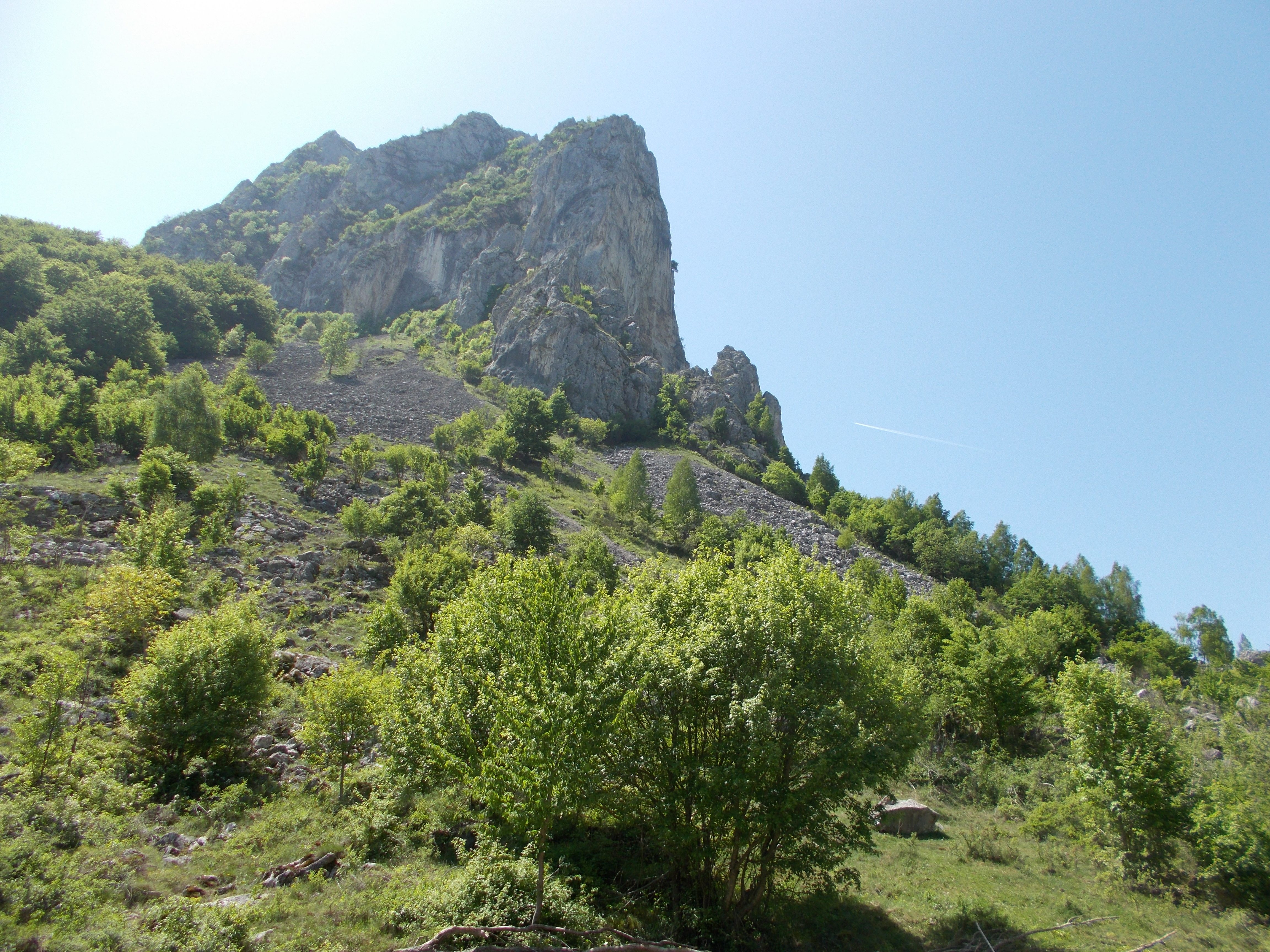 Rezervația naturală Cheile Mănăstirii